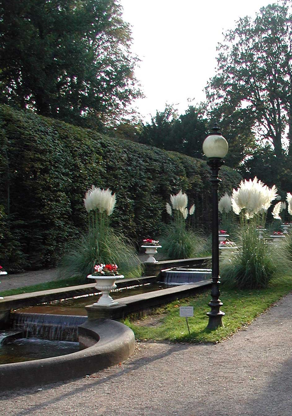 Botanischer Garten ( Flora), Köln-Riehl